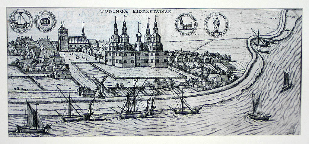 Tönning, 1598, 17,5 cm x 39,5 cm, schwarz-weiß